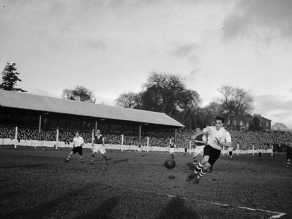 Teitl Cymraeg/Welsh title: Gêm pêl-droed Merthyr yn erbyn Ipswich Ffotograffydd/Photographer: Geoff Charles (1909-2002) Dyddiad/Date: 7/12/1951? (original date) - more likely 24/11/1951 (FA Cup 1st round) Cyfrwng/Medium: Negydd ffilm / Film negative Cyfeiriad/Reference: (gch02444) Rhif cofnod / Record no.: 3368326 Rhagor o wybodaeth am gasgliad Geoff Charles yn Llyfrgell Genedlaethol Cymru More information about the Geoff Charles Collection at the National Library of Wales Mae ffotograffau Geoff Charles hefyd yn rhan o Broject Europeana Libraries Geoff Charles' photographs also form part of the Europeana Libraries Project